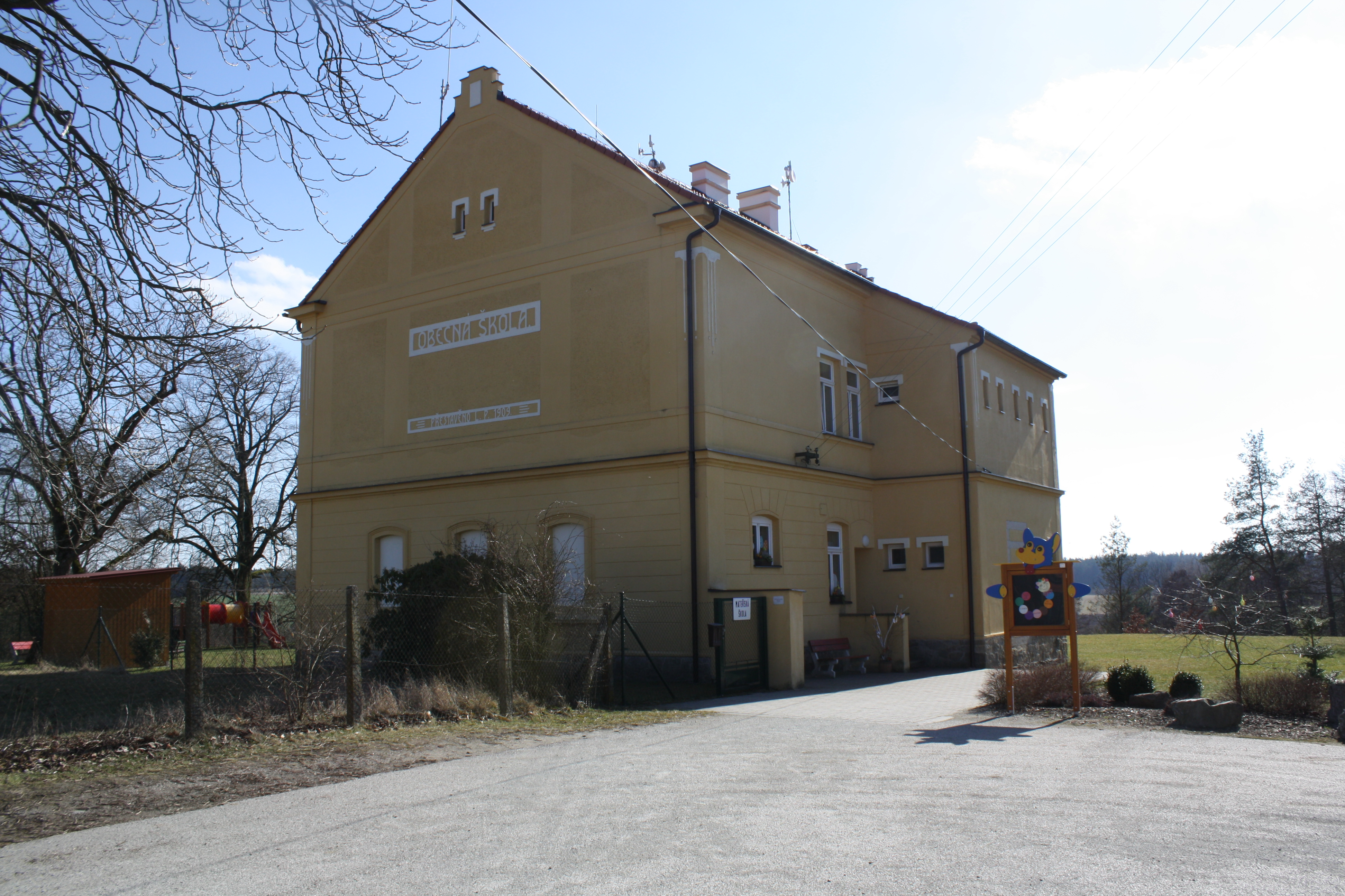 Velechvín (okres České Budějovice), škola